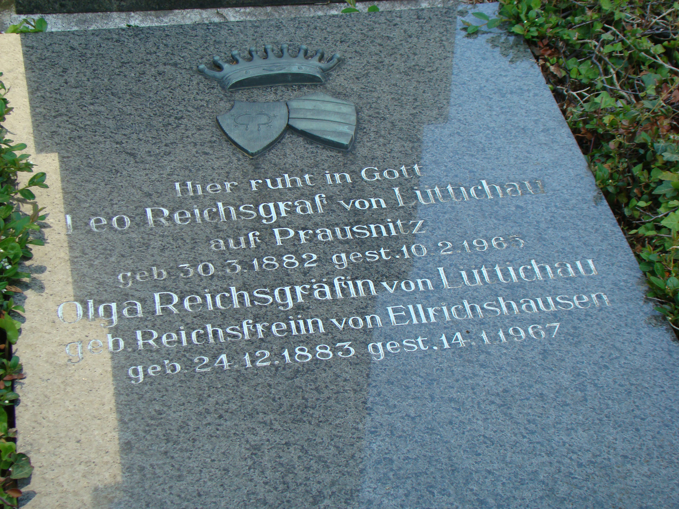 Grabmal Leo Reichsgraf von Lüttichau / Olga von Ellrichshausen auf dem Friedhof in Züttlingen